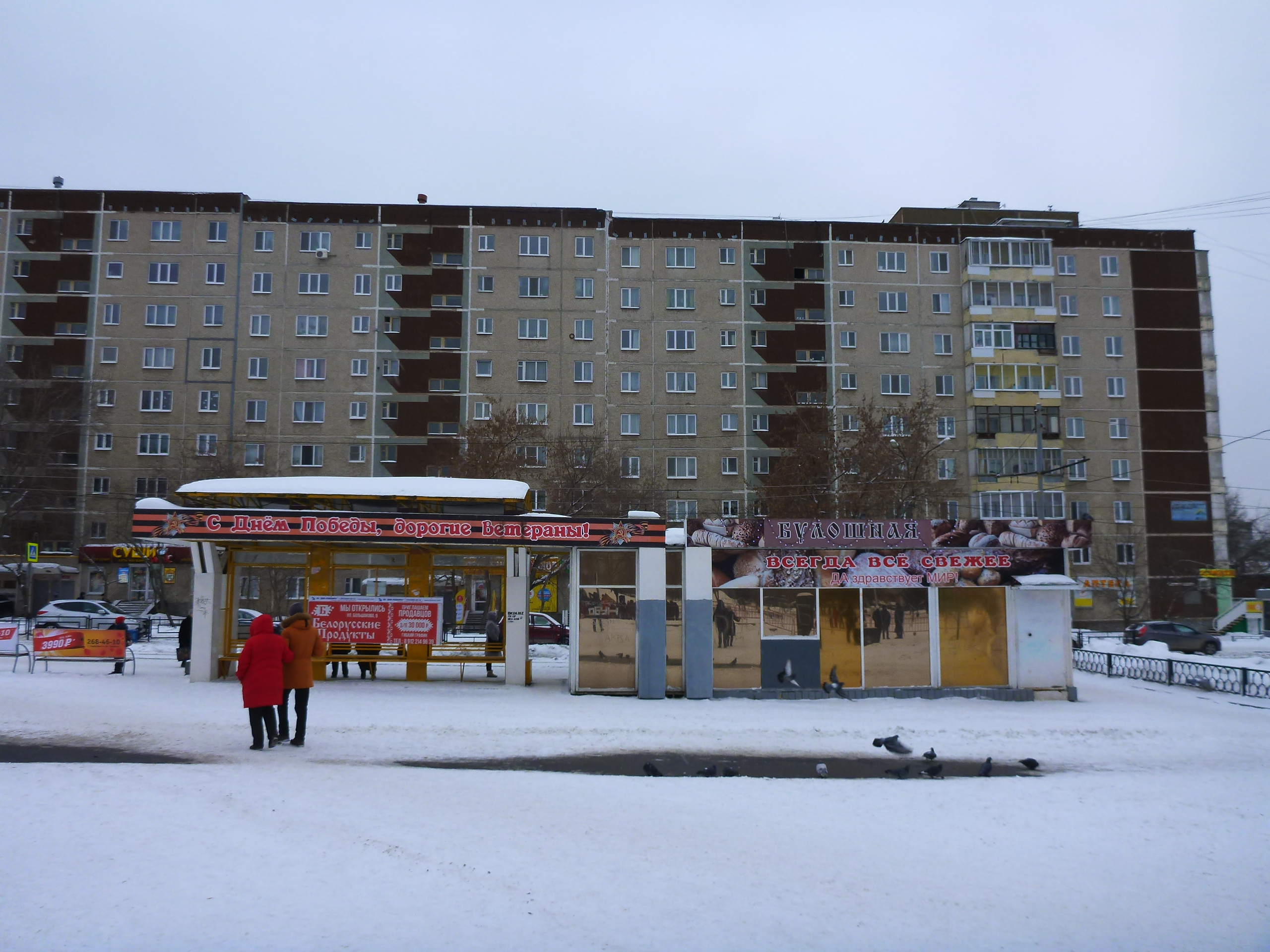 Булошная в Екатеринбурге 1 февраля 2020 года